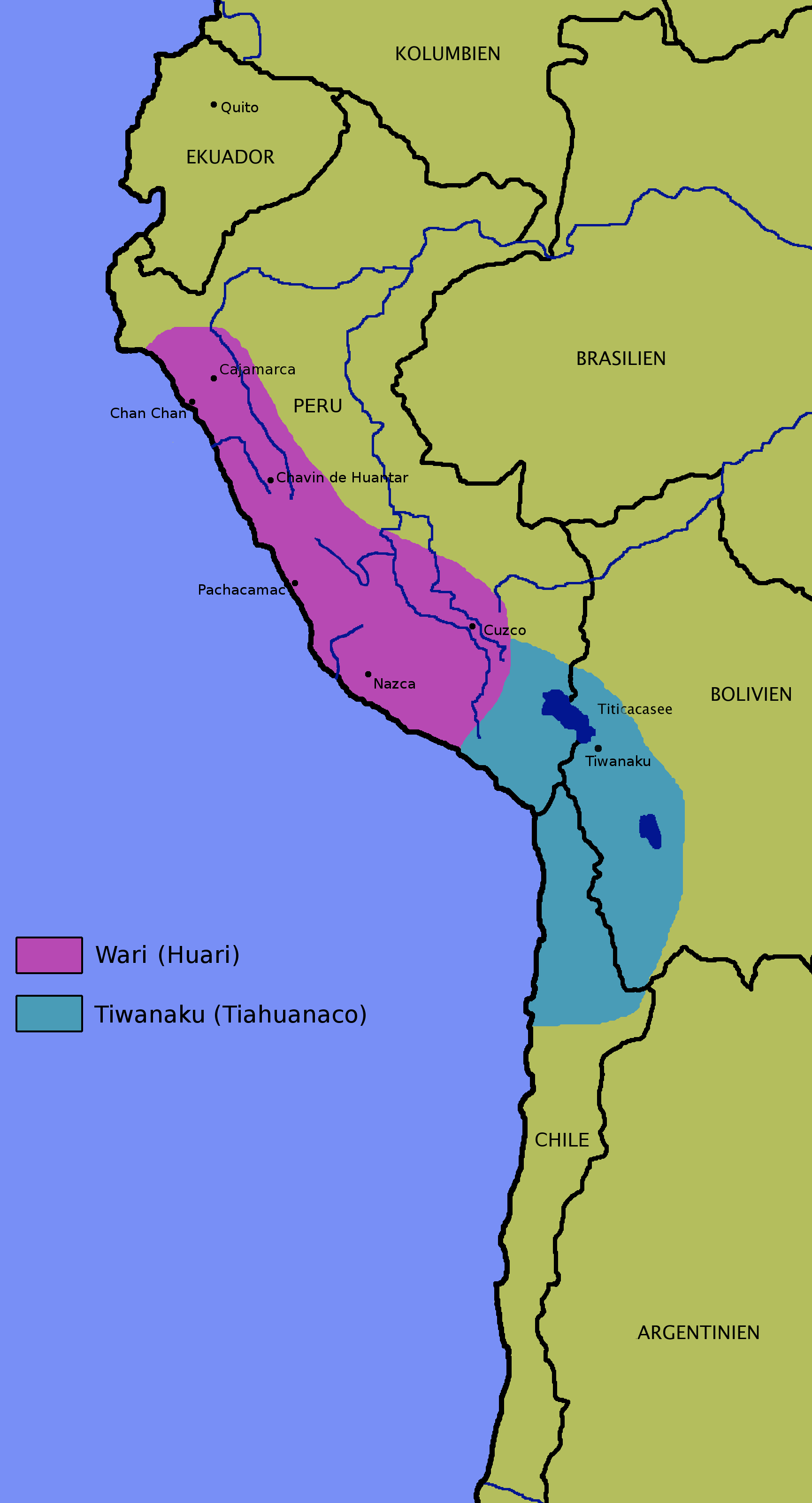 Description: Wari (Huari).